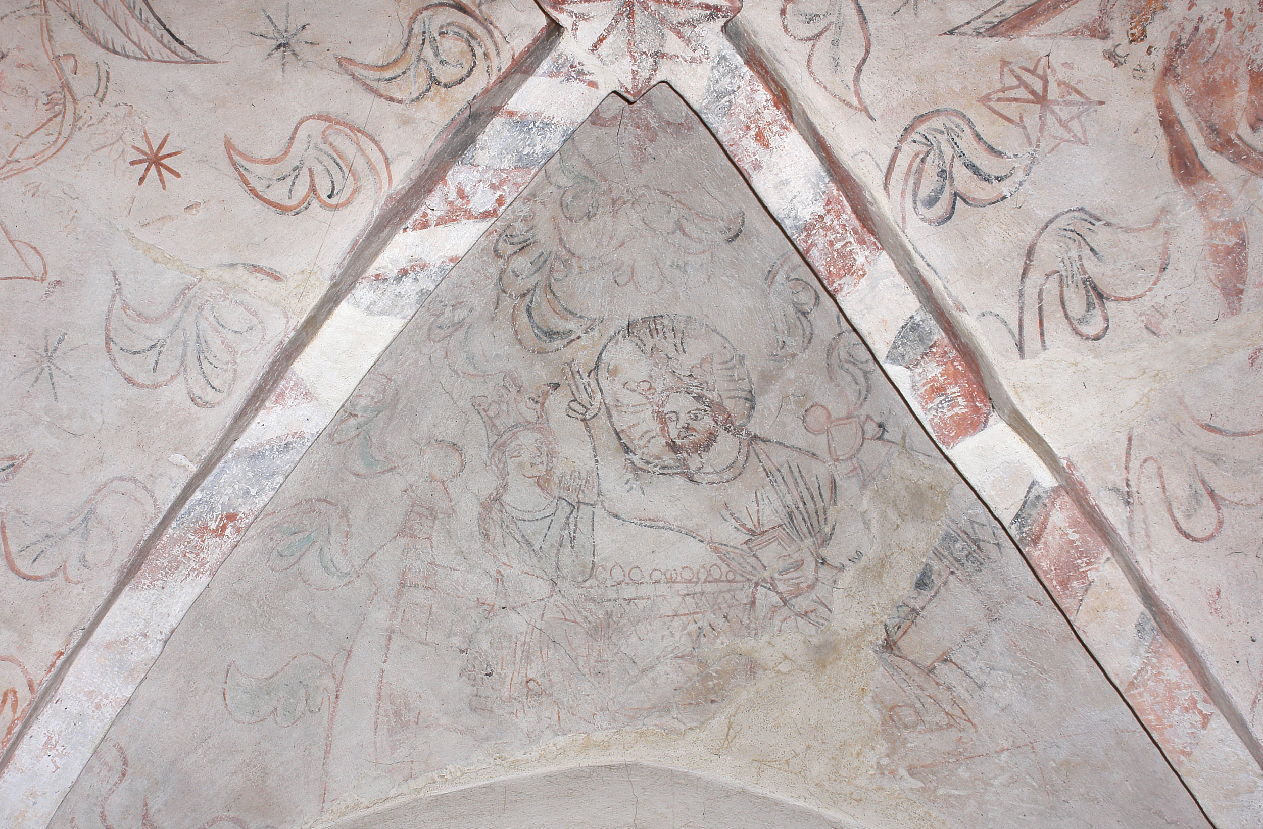 Kirche von Nødebo, Dänemark (Nord-Seeland). Fresken im spätromanischen Stil von 1425, ausgeführt von einem Künstler, der für die langen Nasen seiner Personen bekannt ist. Fresko im Chor: Christus, der einen irdischen König segnet.